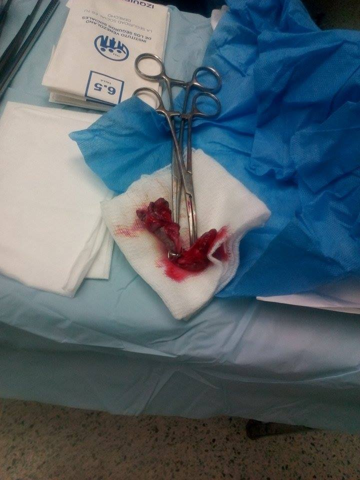 Apéndice Vermiforme extraída en apendicectomía.